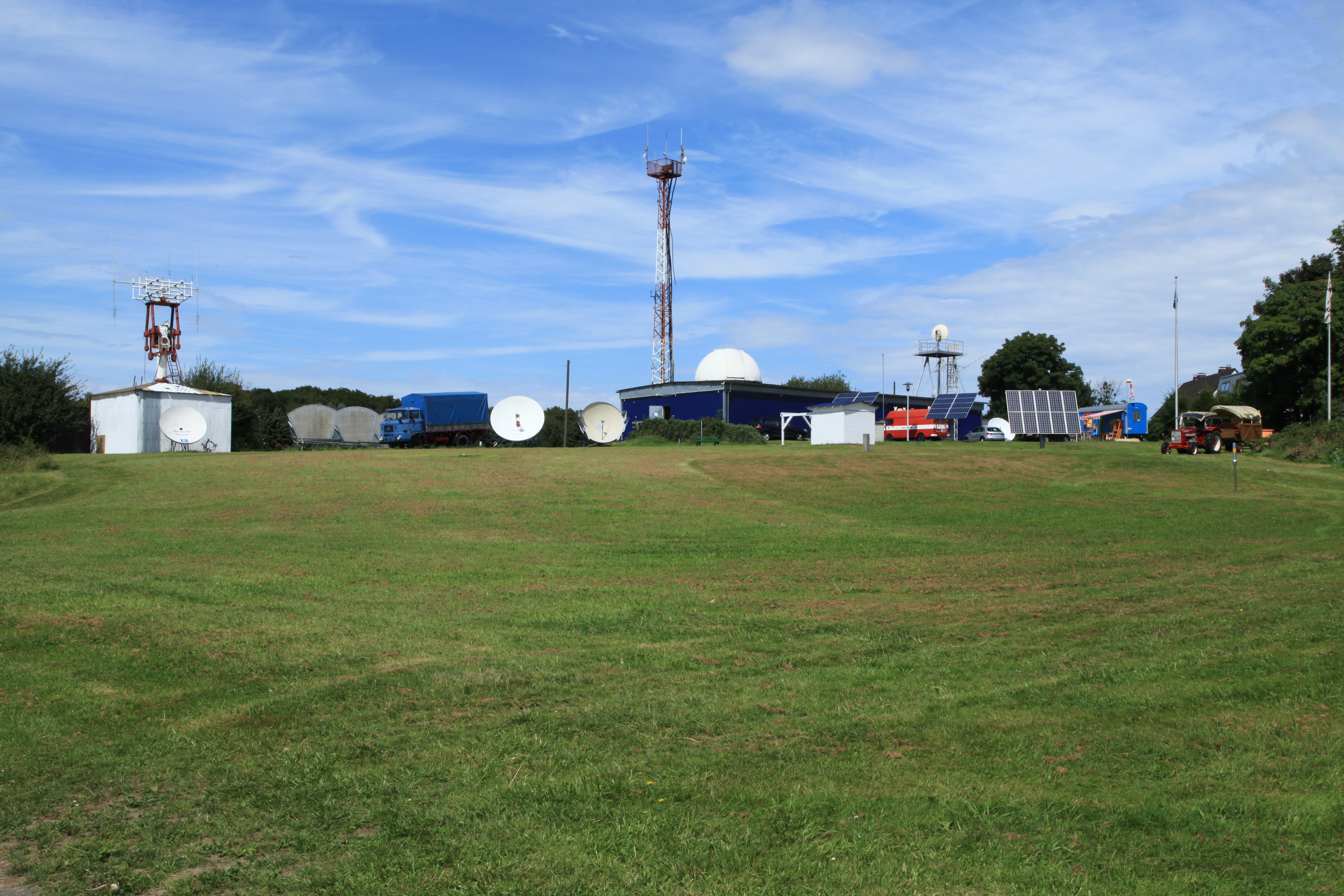 Sternwarte Bochum an der Blankensteiner Straße in Bochum